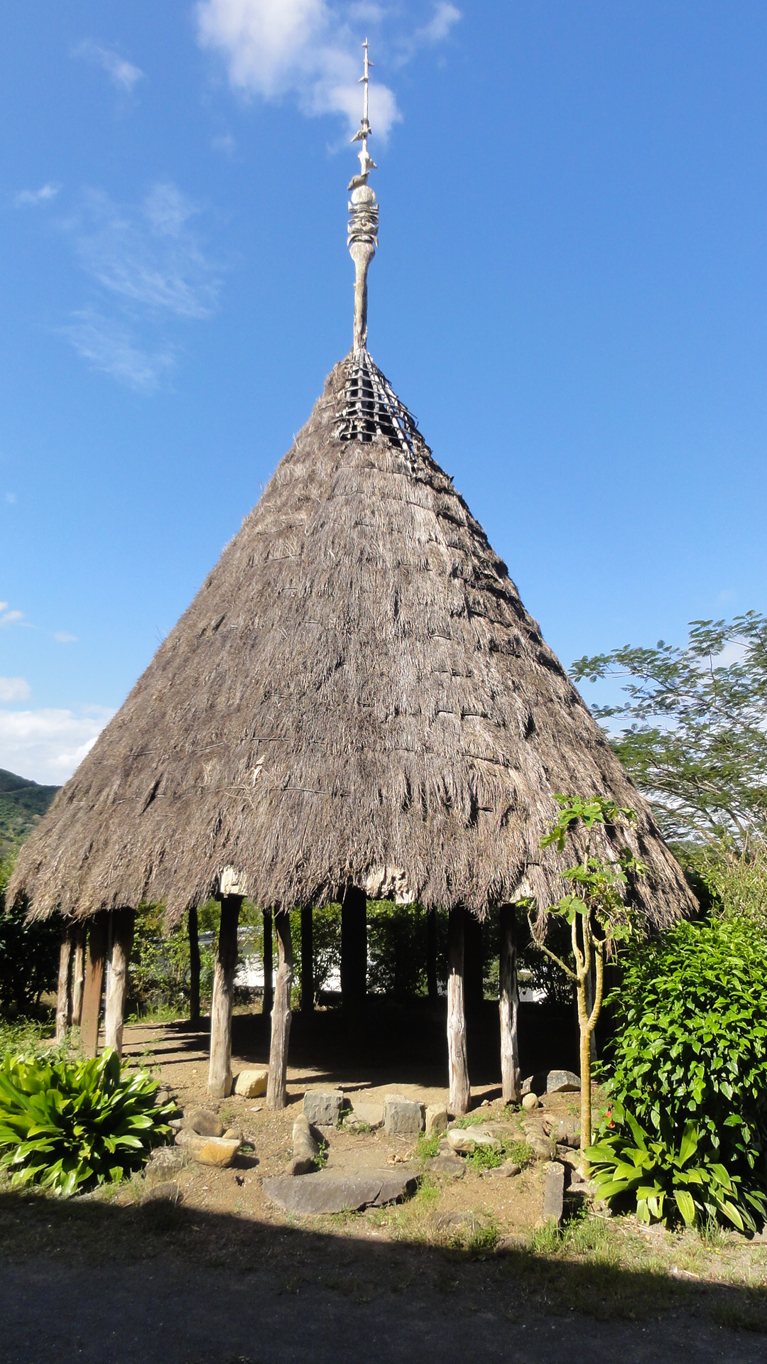 Musée de Bourail